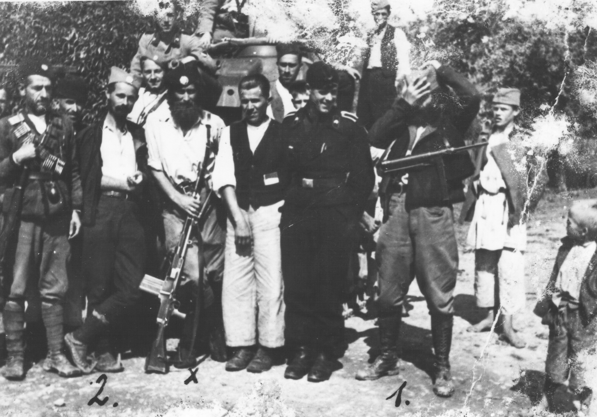 Srpskohrvatski / српскохрватски: Četnički vojvoda Kerović sa Nemcima u Loparima, juna 1942.